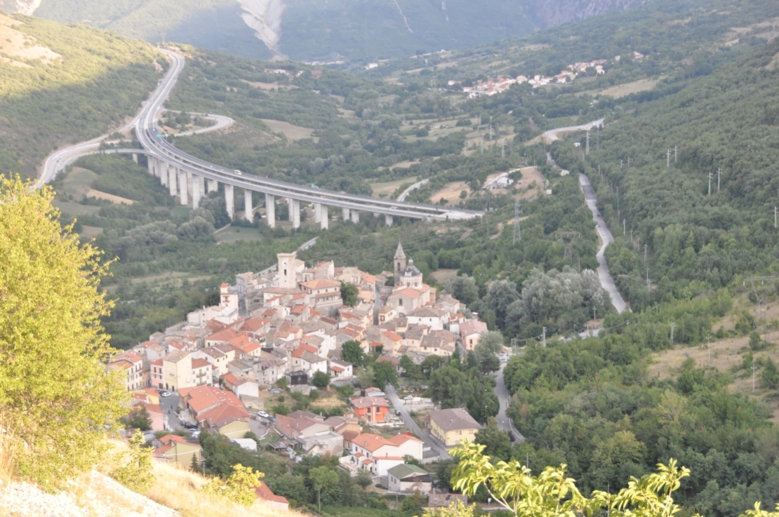 Cocullo 2012